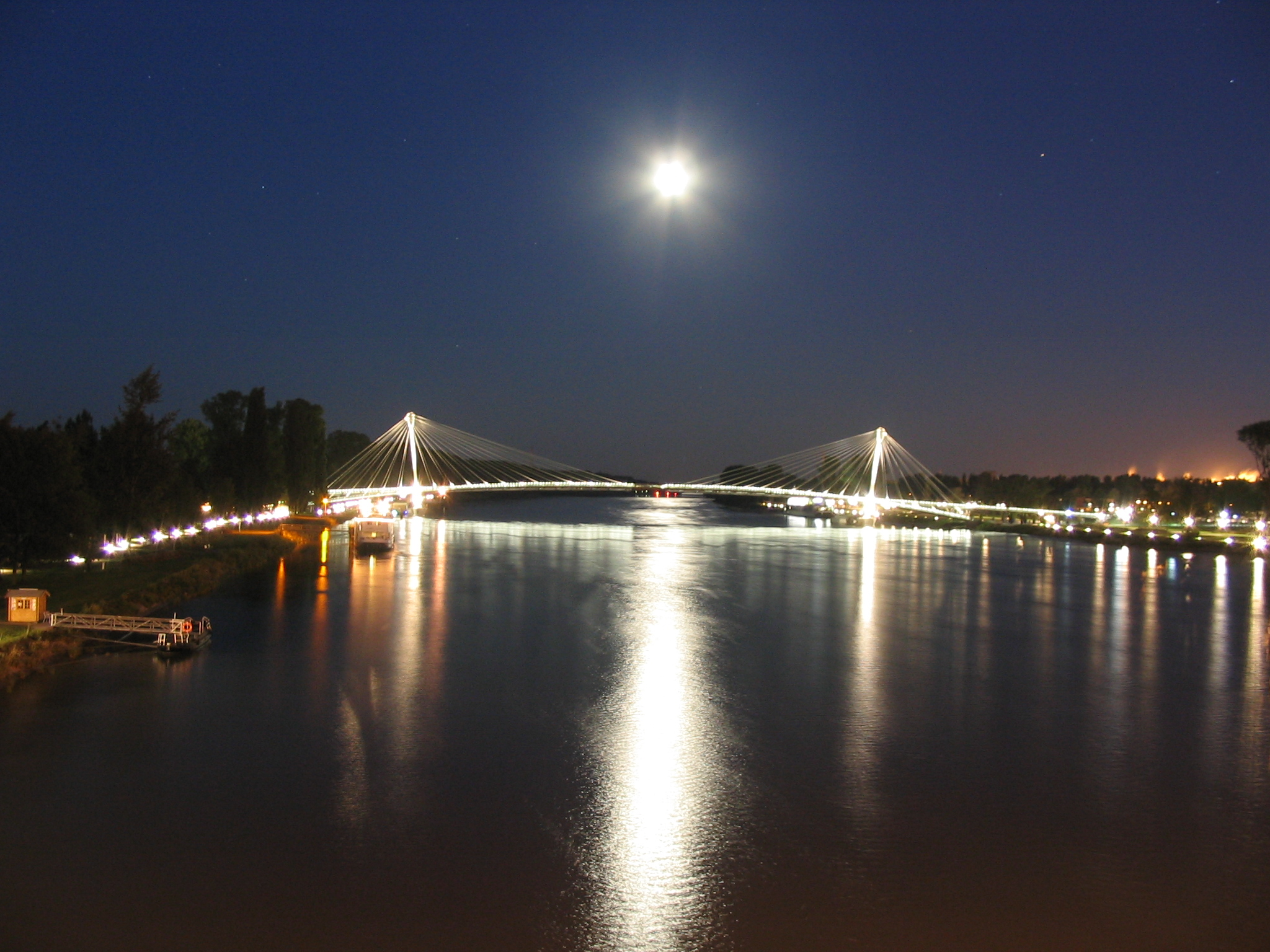 Brug vir voetgangers in Straatsburg.